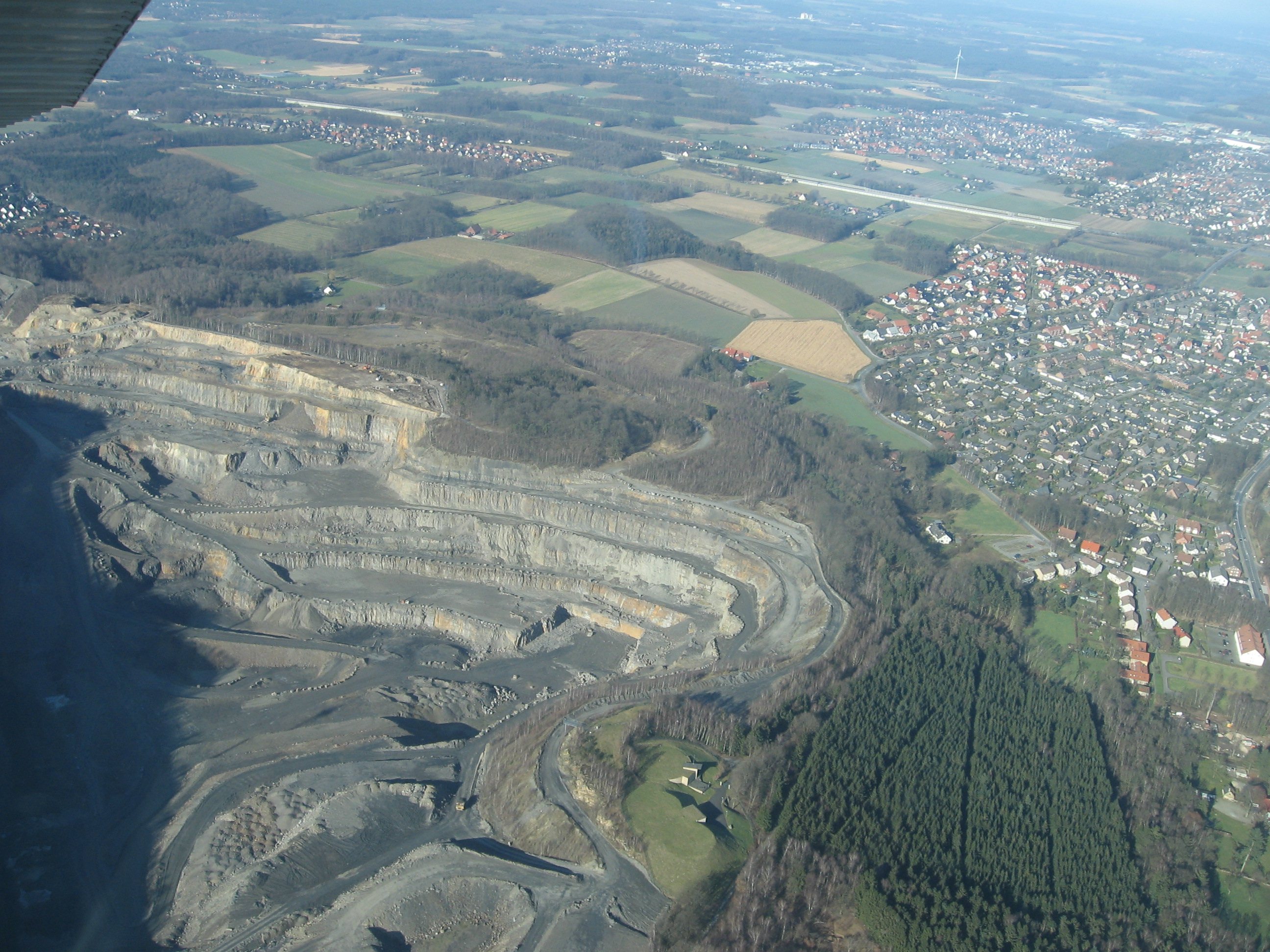 Der Piesberg